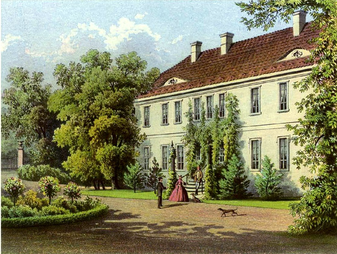 Gut Priemern, Kreis Osterburg, Provinz Brandenburg, Lithographie von Alexander Duncker, 1869